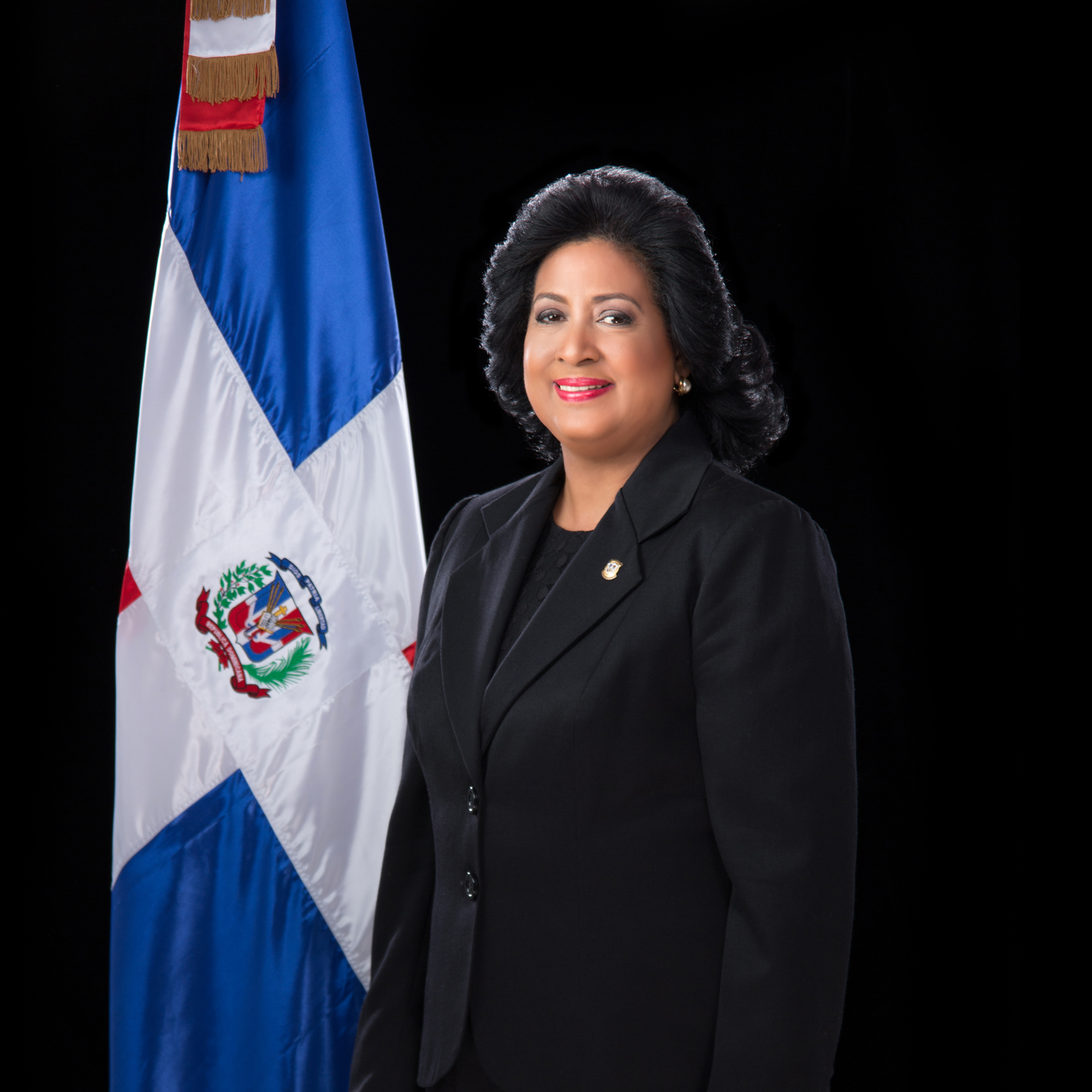 Lic. Cristina Lizardo Mézquita